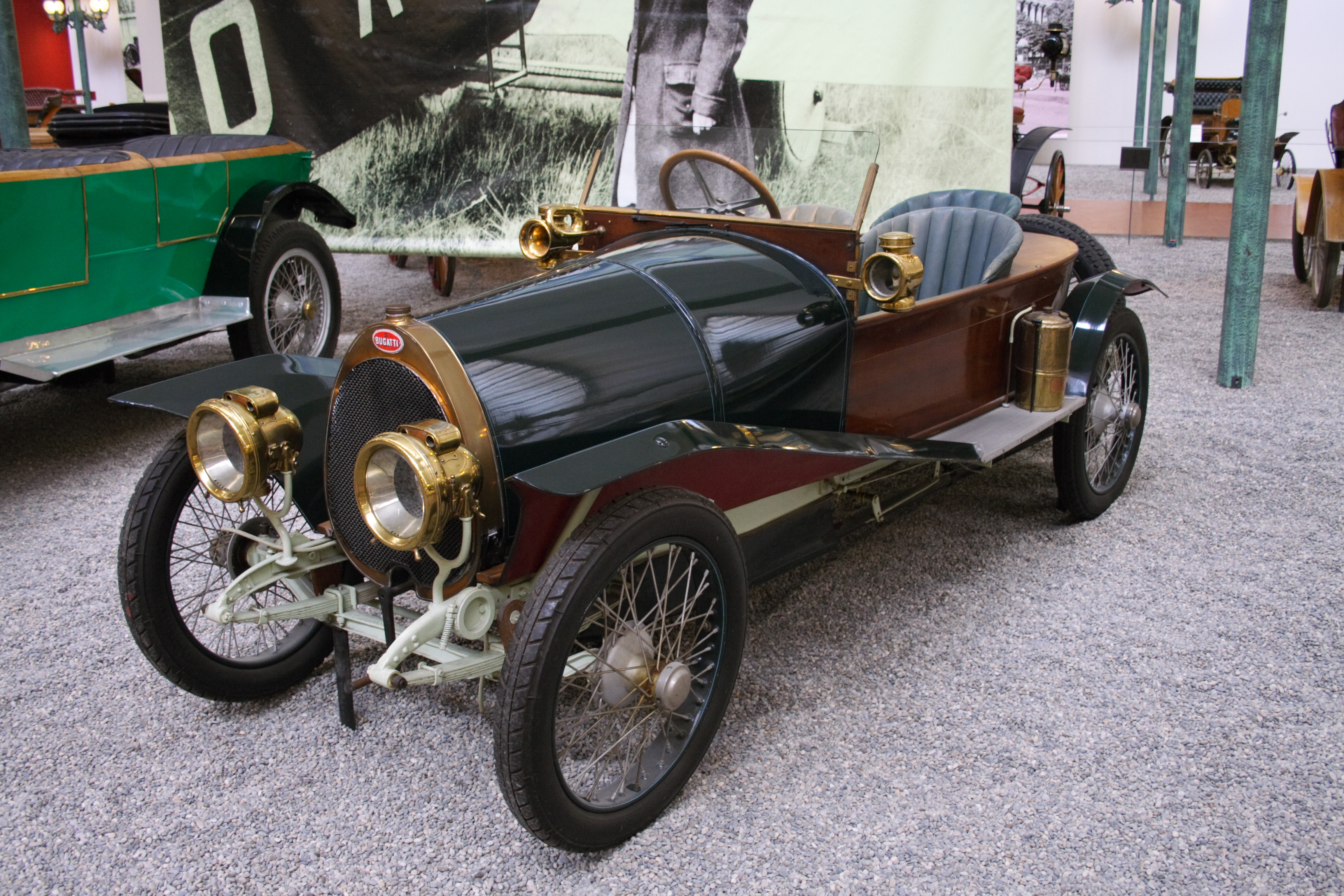 Bugatti Type 17 1914 at the Musée National de l'Automobil(Mulhouse, France)